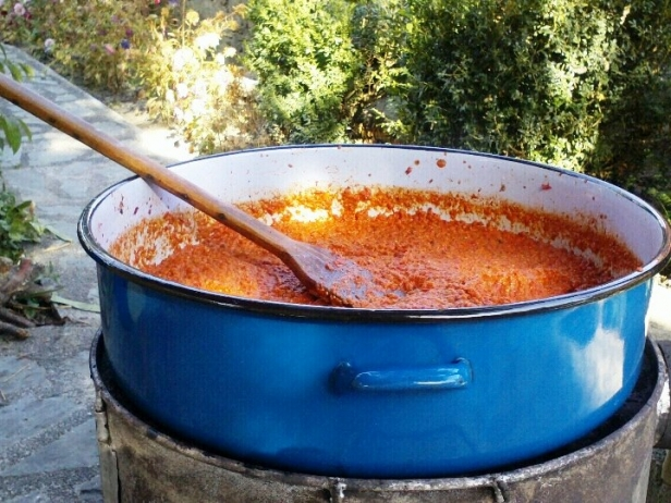 ајвар, македонски специјалитет каде основна состојка се пиперките